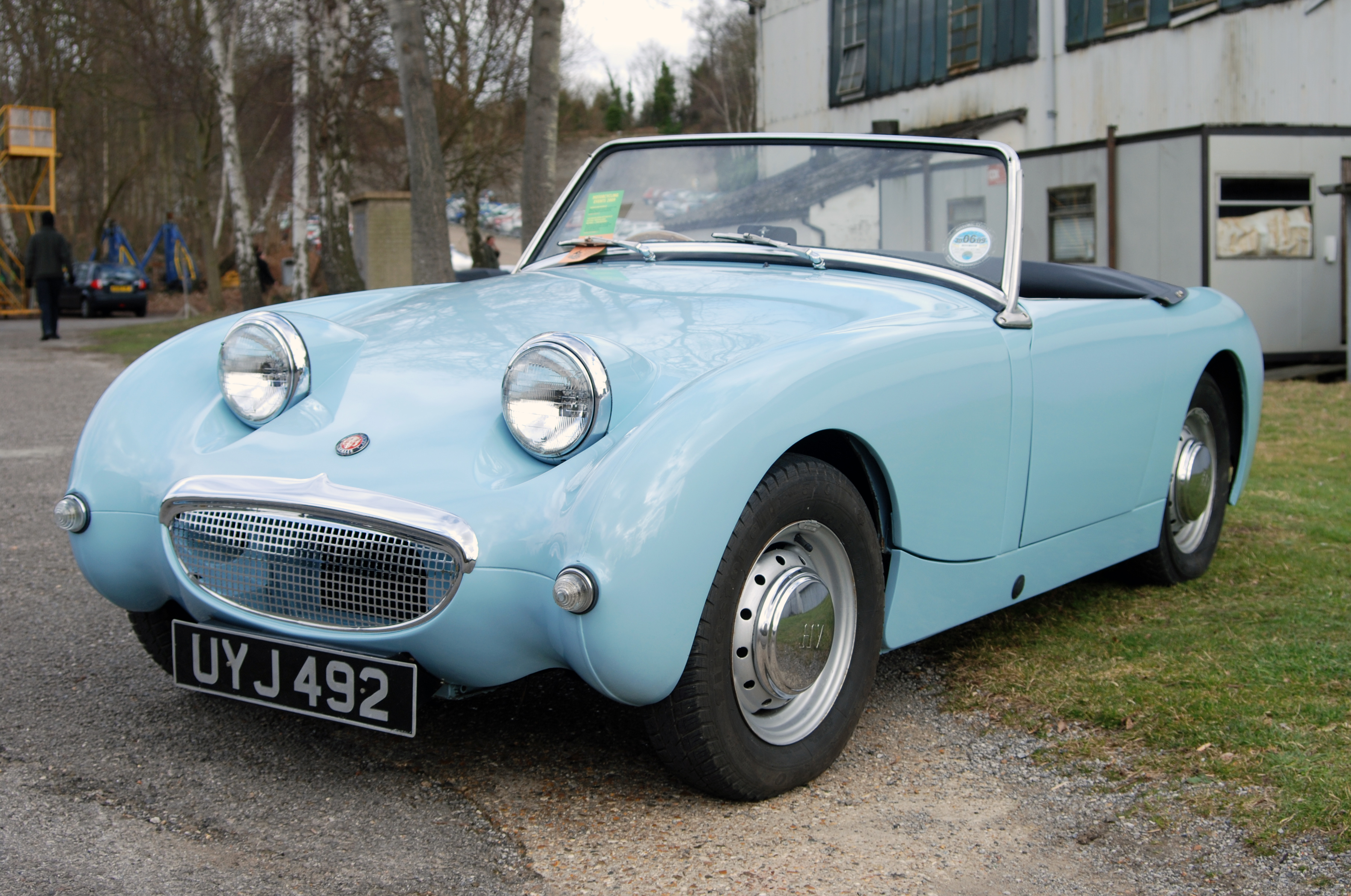 Brooklands,Mar 2009